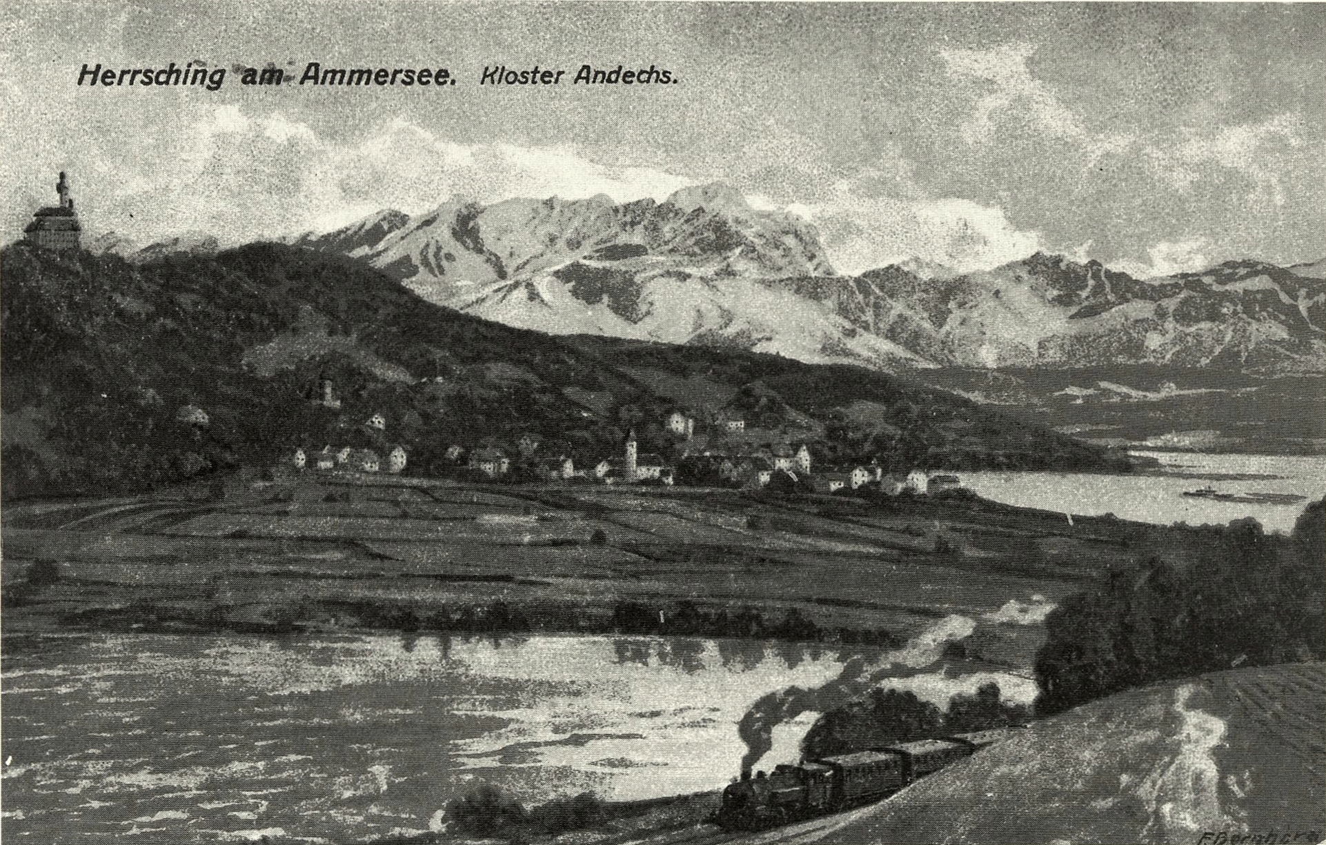 Herrsching am Ammersee auf einer Postkarte von 1905. Im Vordergrund links der Pilsensee, rechts ein dampflokbespannter Personenzug auf der Lokalbahn Pasing–Herrsching, im Hintergrund links Kloster Andechs und rechts der Ammersee vor der Alpenkulisse